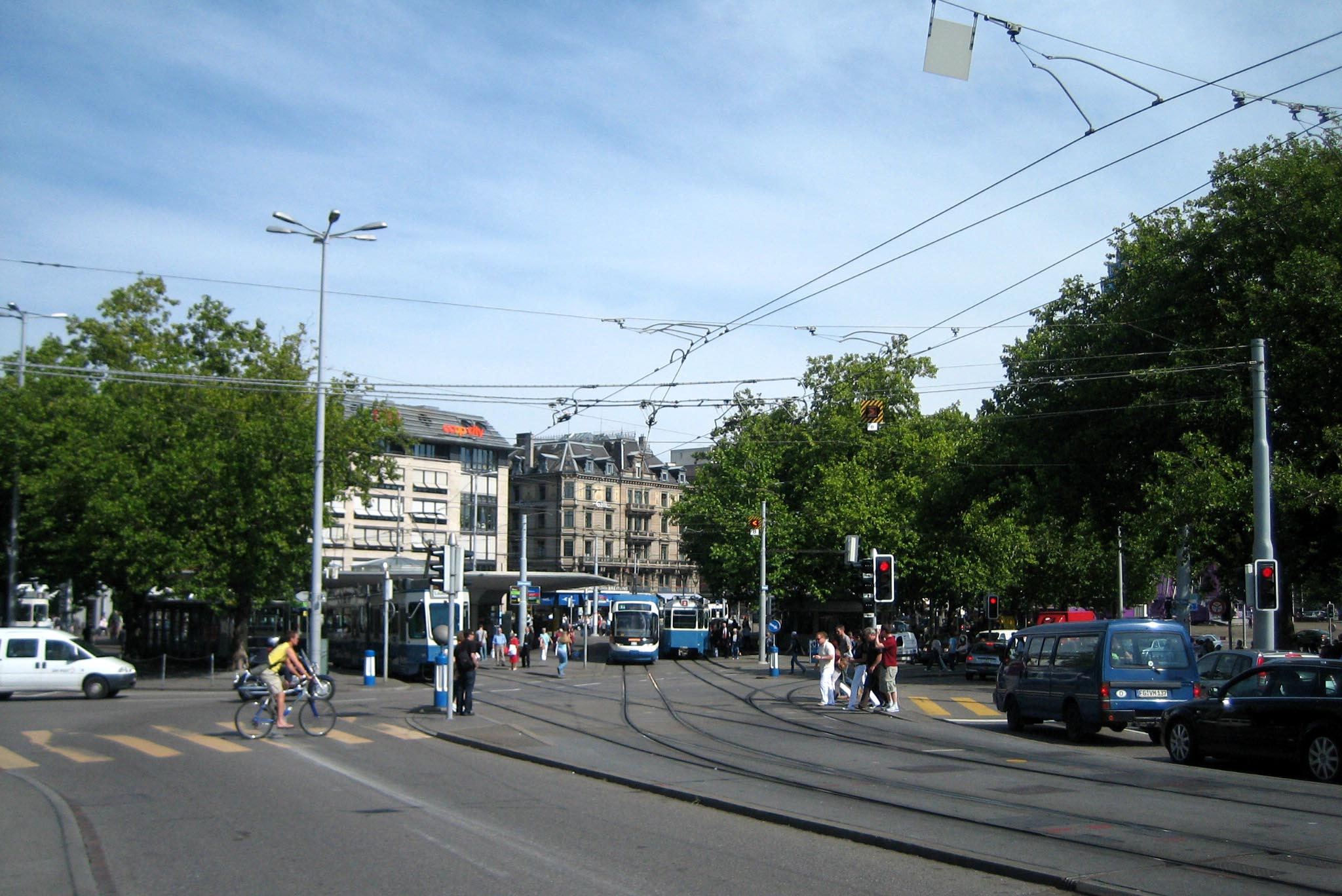 Bellevue Richtung Ost